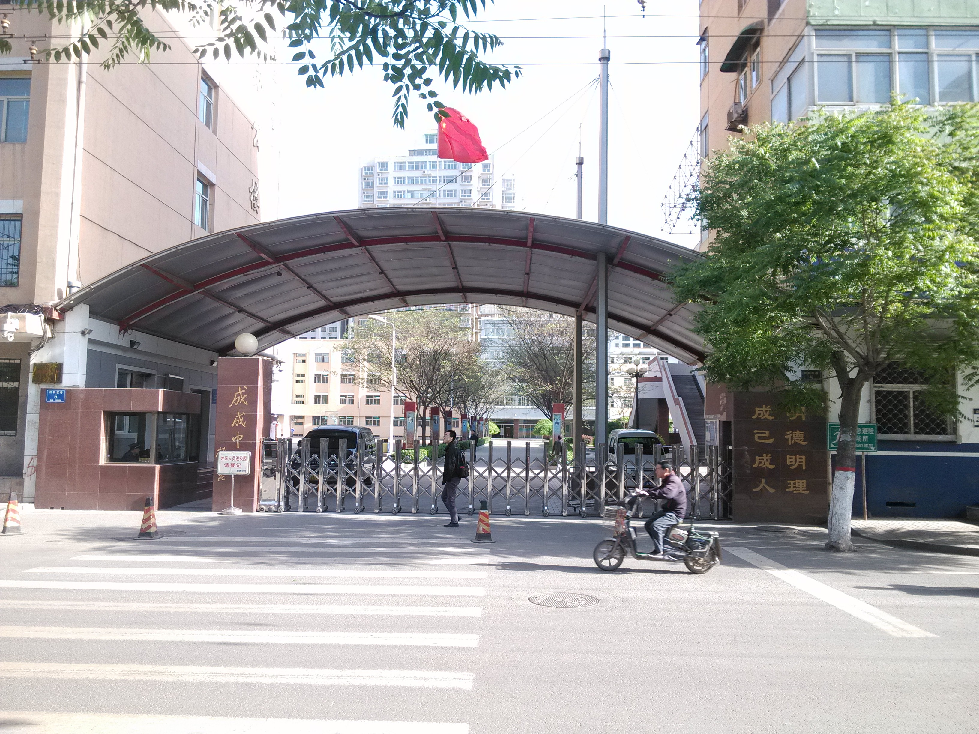 中文（中国大陆）: 太原成成中学校门。